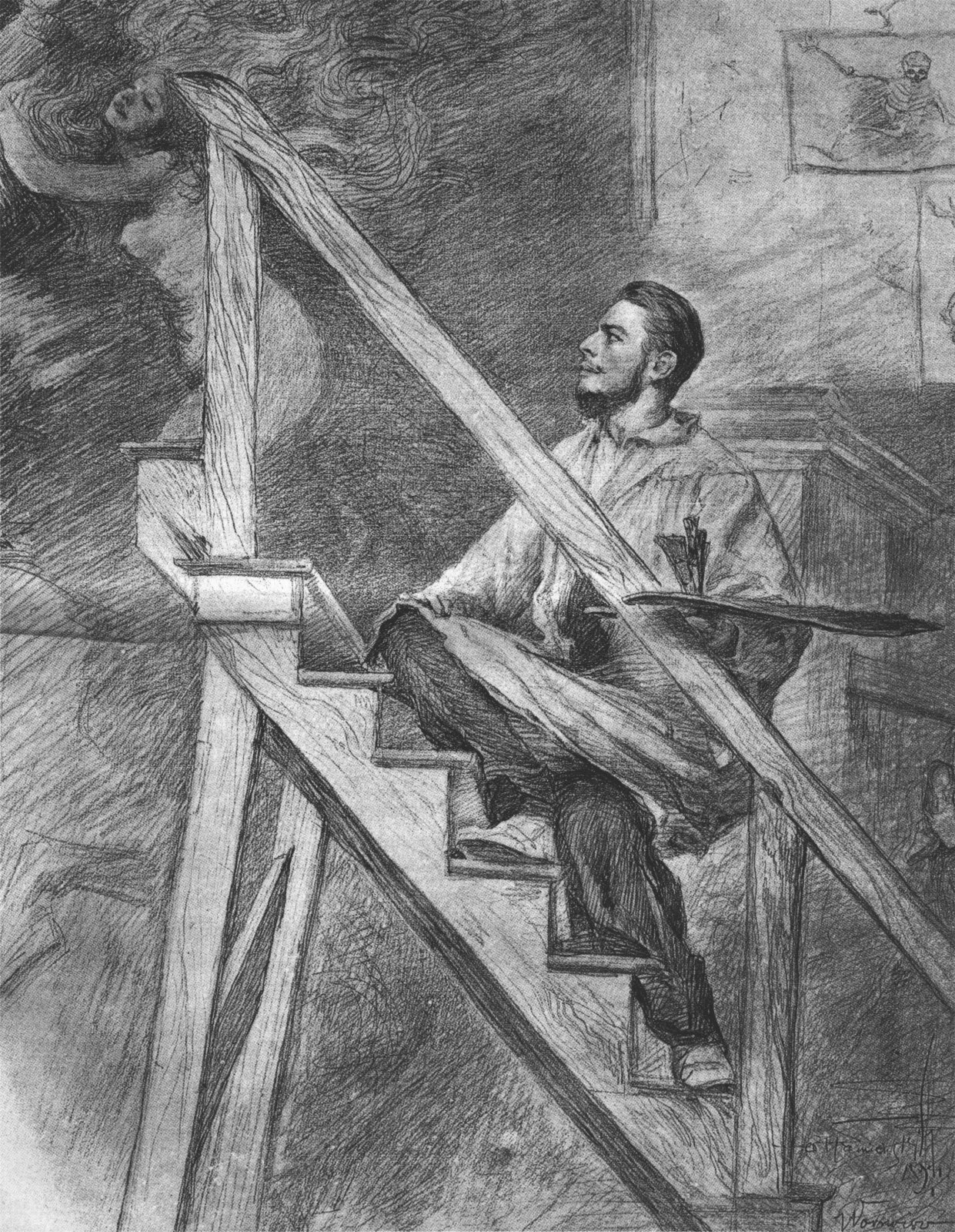 Władysław Podkowiński malujący "Szał" Drawing, 15x20, original lost, published in "Tygodnik Ilustrowany" 1895, Instytut Sztuki PAN